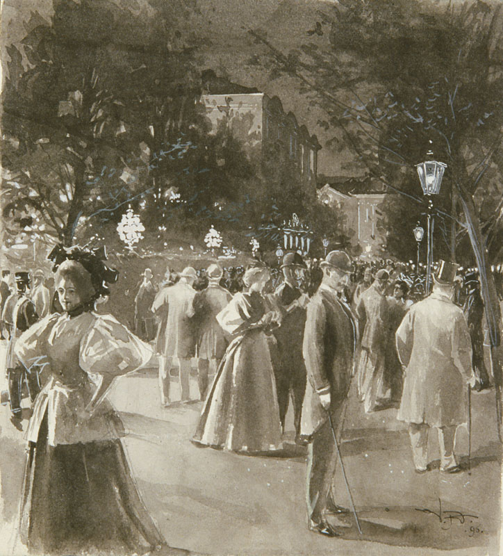 Publikbild från Kungsträdgården